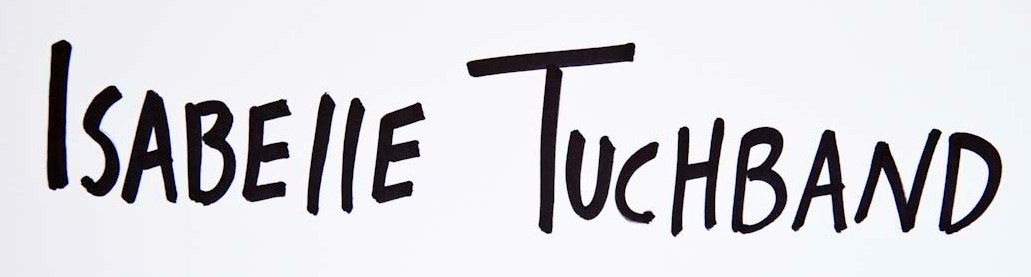 Assinatura Isabelle Tuchband